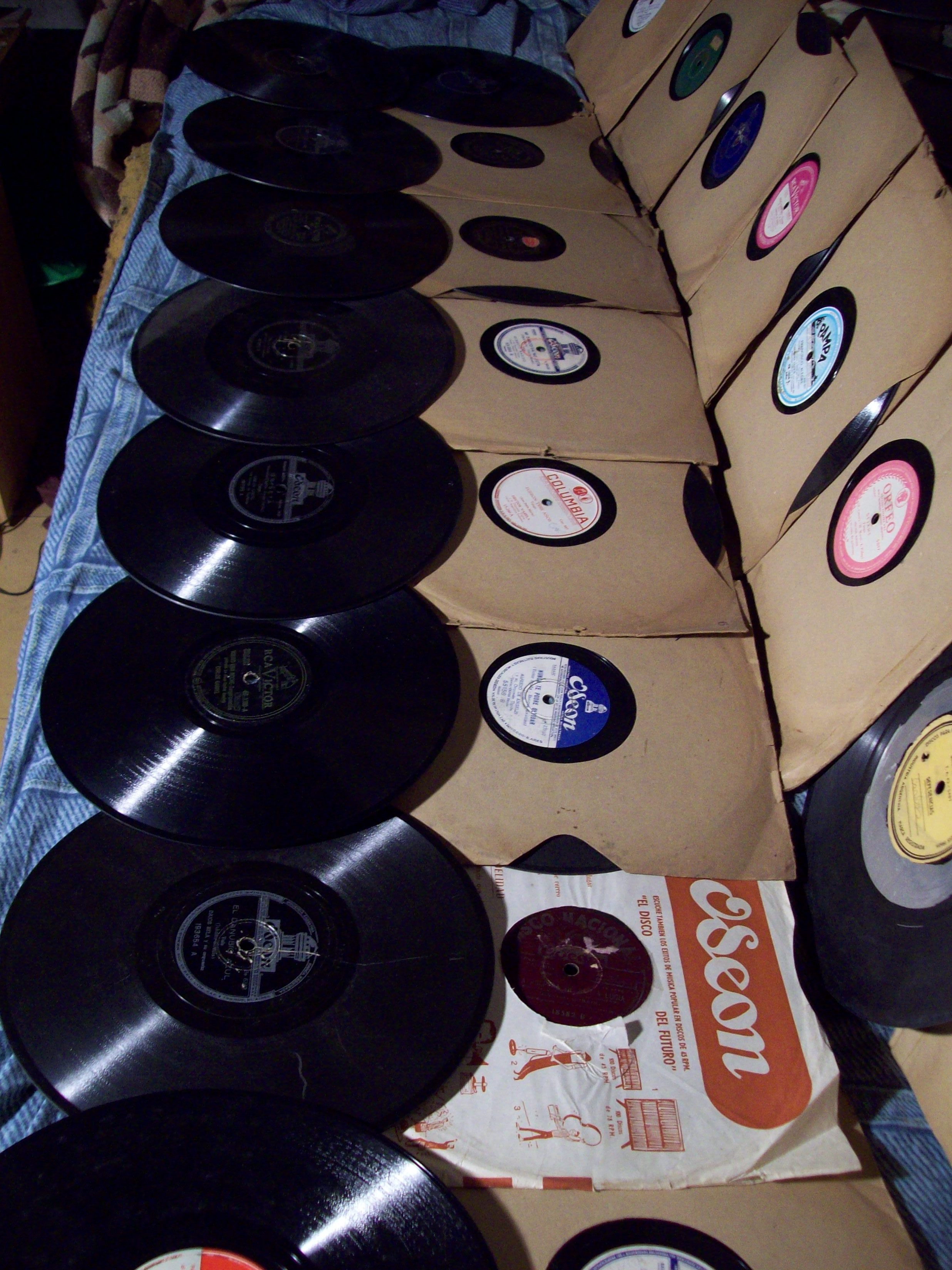 Variedad de discos de pasta de 78 RPM de 10".